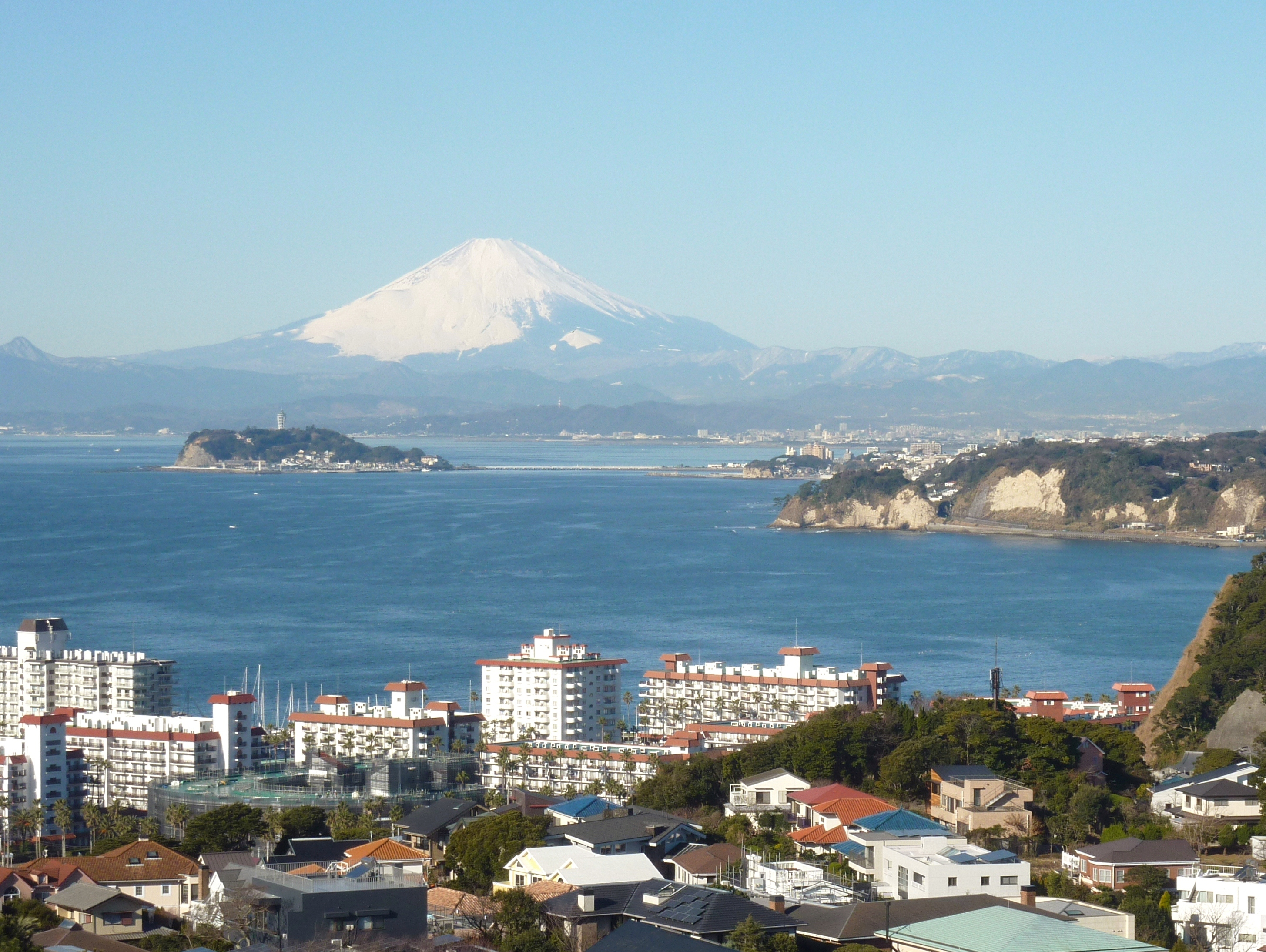 神奈川県逗子市・披露山公園からの富士山と江の島